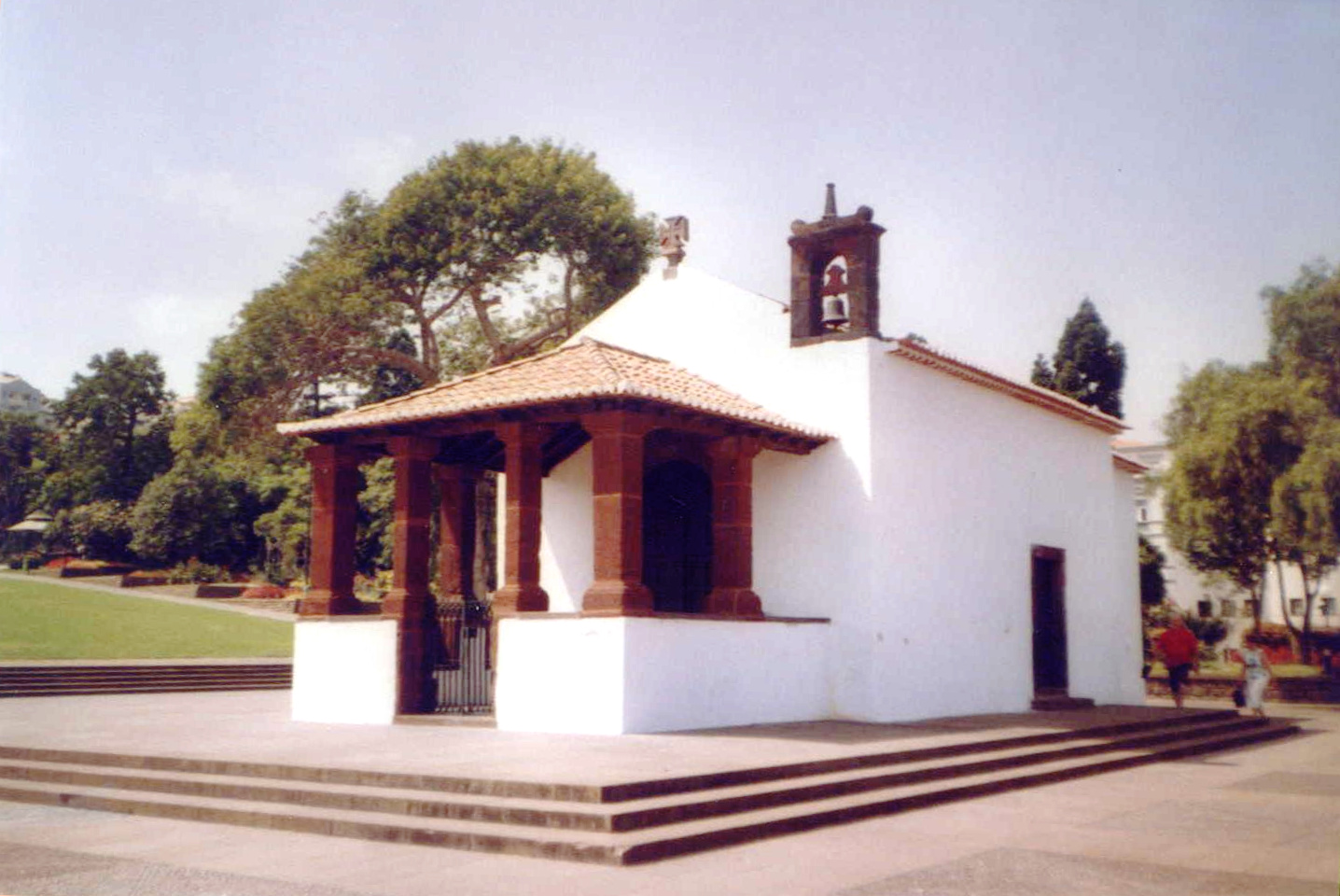 Capela de Santa Catarina (Funchal)